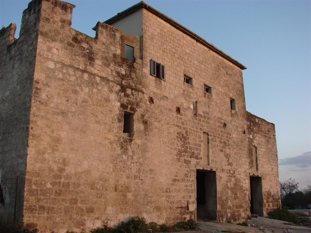 חאן רמת ישי - צד דרום 2